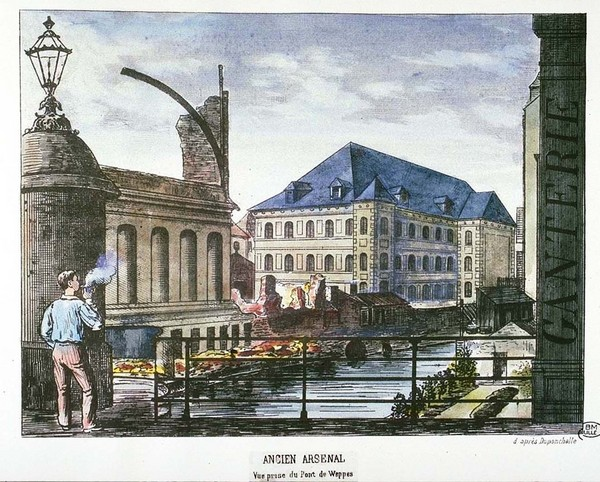 Lille : Ancien arsenal, vue prise du Pont de Weppes, d'après Duponchelle date : circa 1895 [1895] dimensions : 25 x 33 cm. technique : lithographie